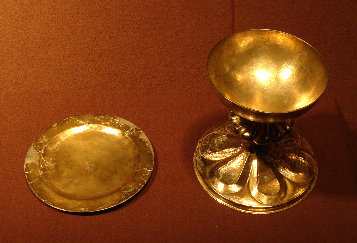 Bremer Dom (Museum): Patene und Kelch, Norddeutschland, Bremen (?), um oder nach 1400, fotografiert von Jürgen Howaldt